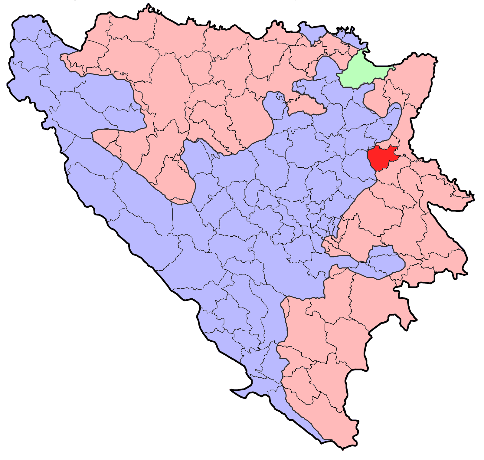 Republika Srpska (BiH) municipality